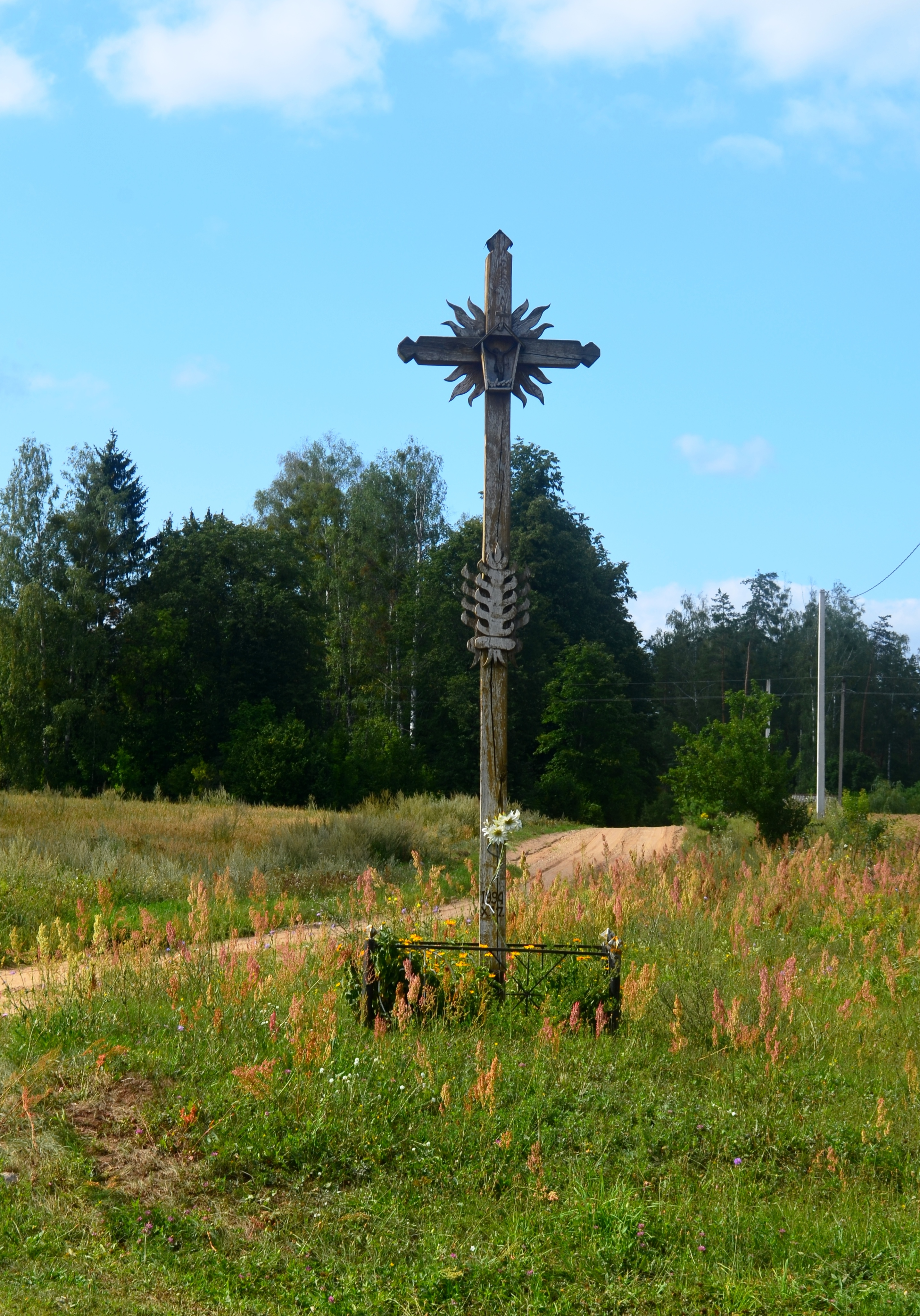 Kryžius Samūniškėse, Varėnos raj.